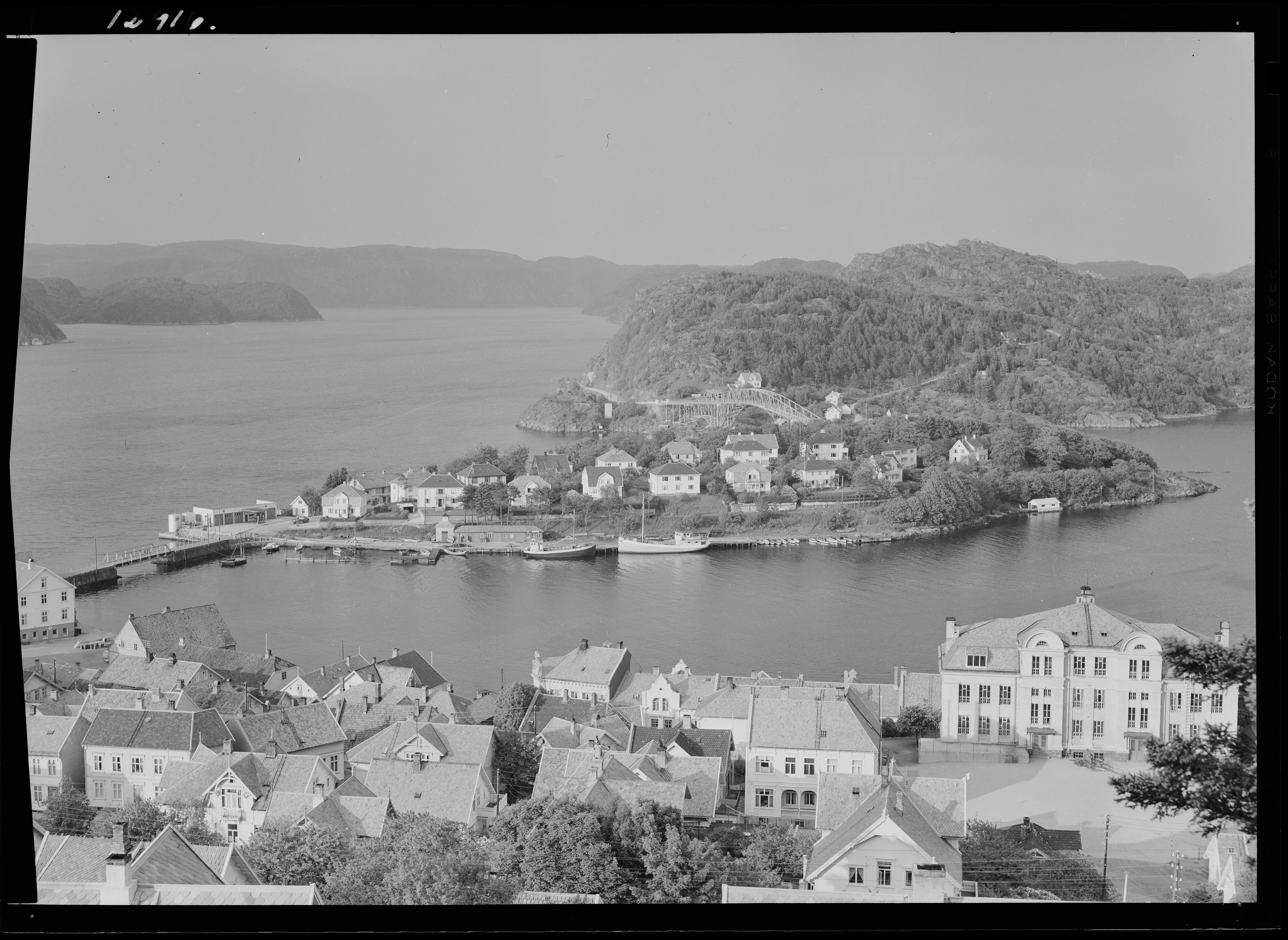 Bildet er hentet fra Nasjonalbibliotekets bildesamling. Anmerkninger til bildet var: Fotograf : L.S. Farsund, Farsund, Vest Agder